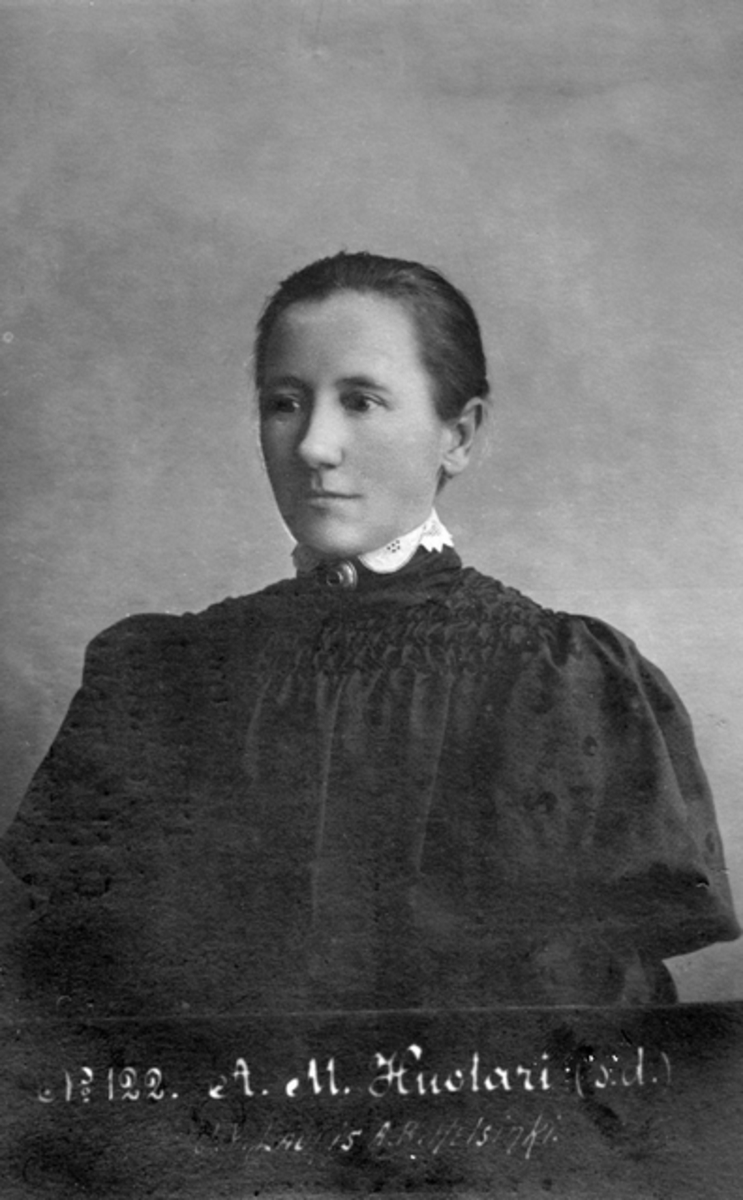 kansanedustaja Anni Huotari; pysty, mustavalkoinen, liimattu kartongille lehtileikekuvan kanssa